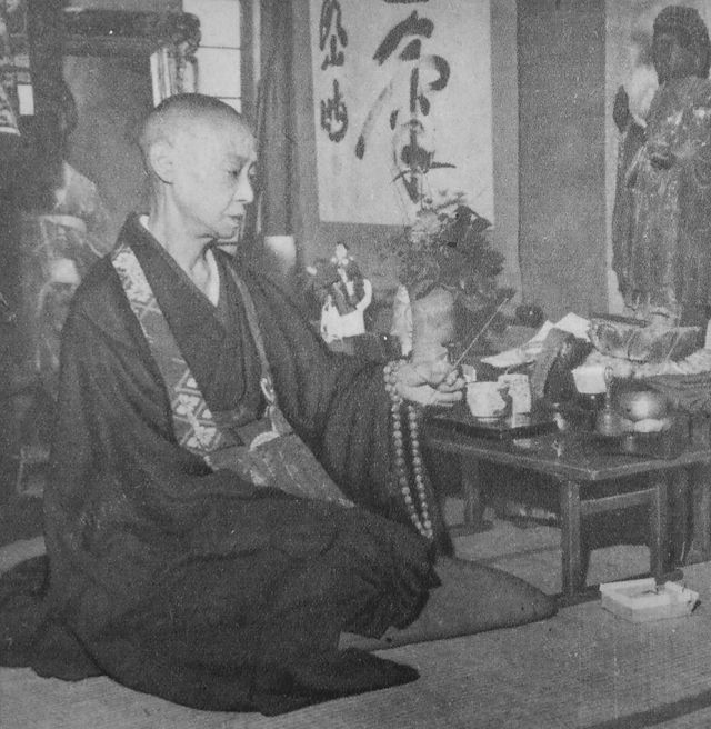 安藤照子